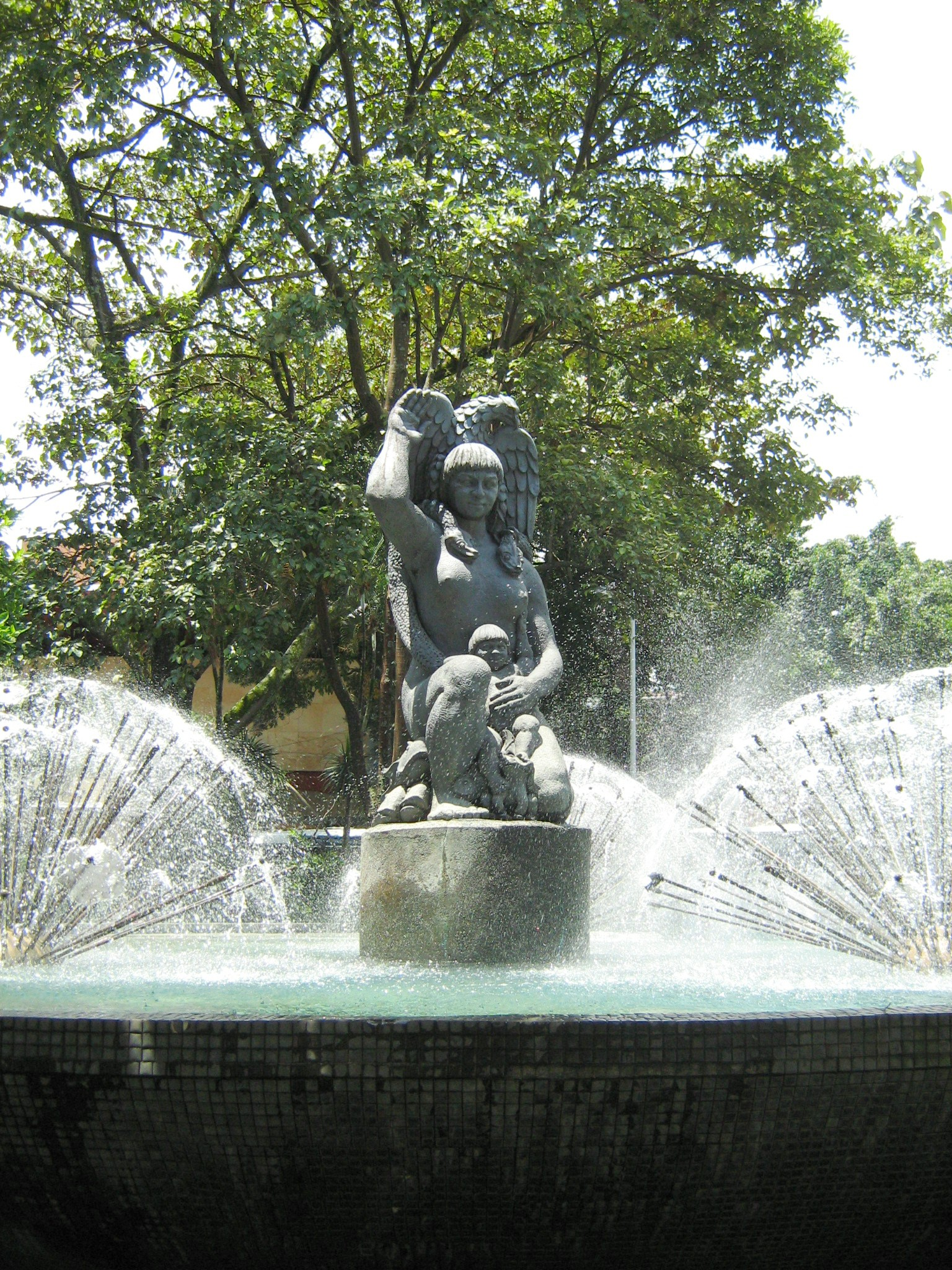 La Bachué obra de José Horacio Betancur, hace parte de la fuente ubicada al frente del Teatro Pablo Tobón Uribe. Medellín, Colombia.